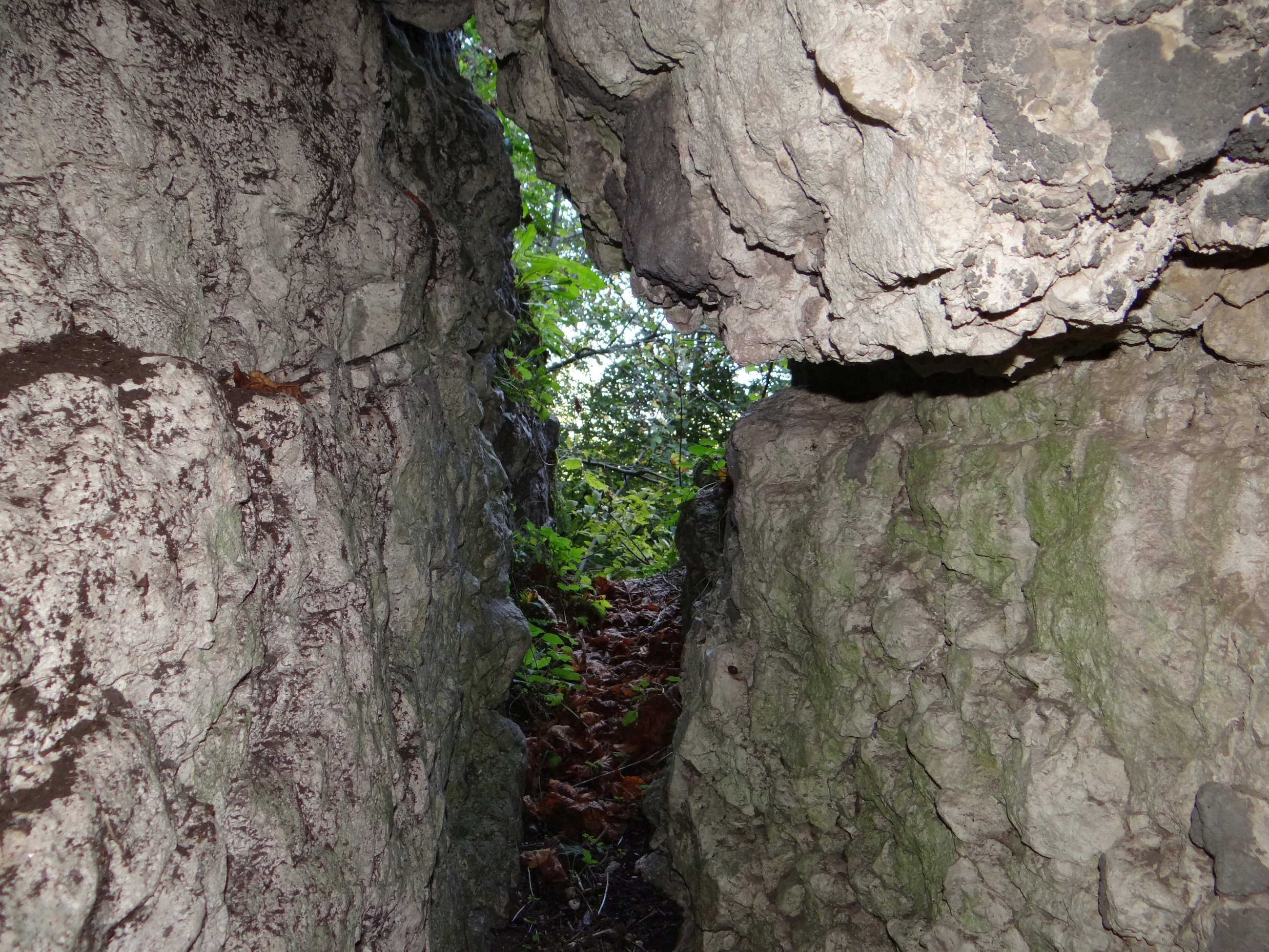 Szczelina za Igłą